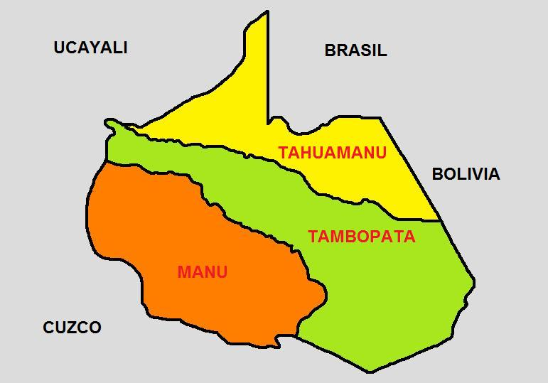 Imagen que muestra la División Politica del Departamento de Madre de Dios, una de las 25 circunscripciones en que se divide el Perú